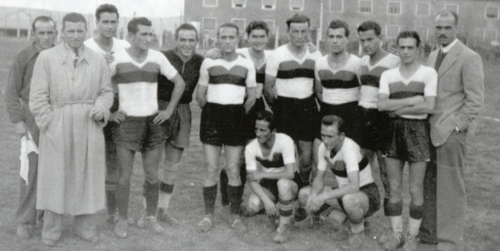 Formazione del Colleferro calcio 1942-1943